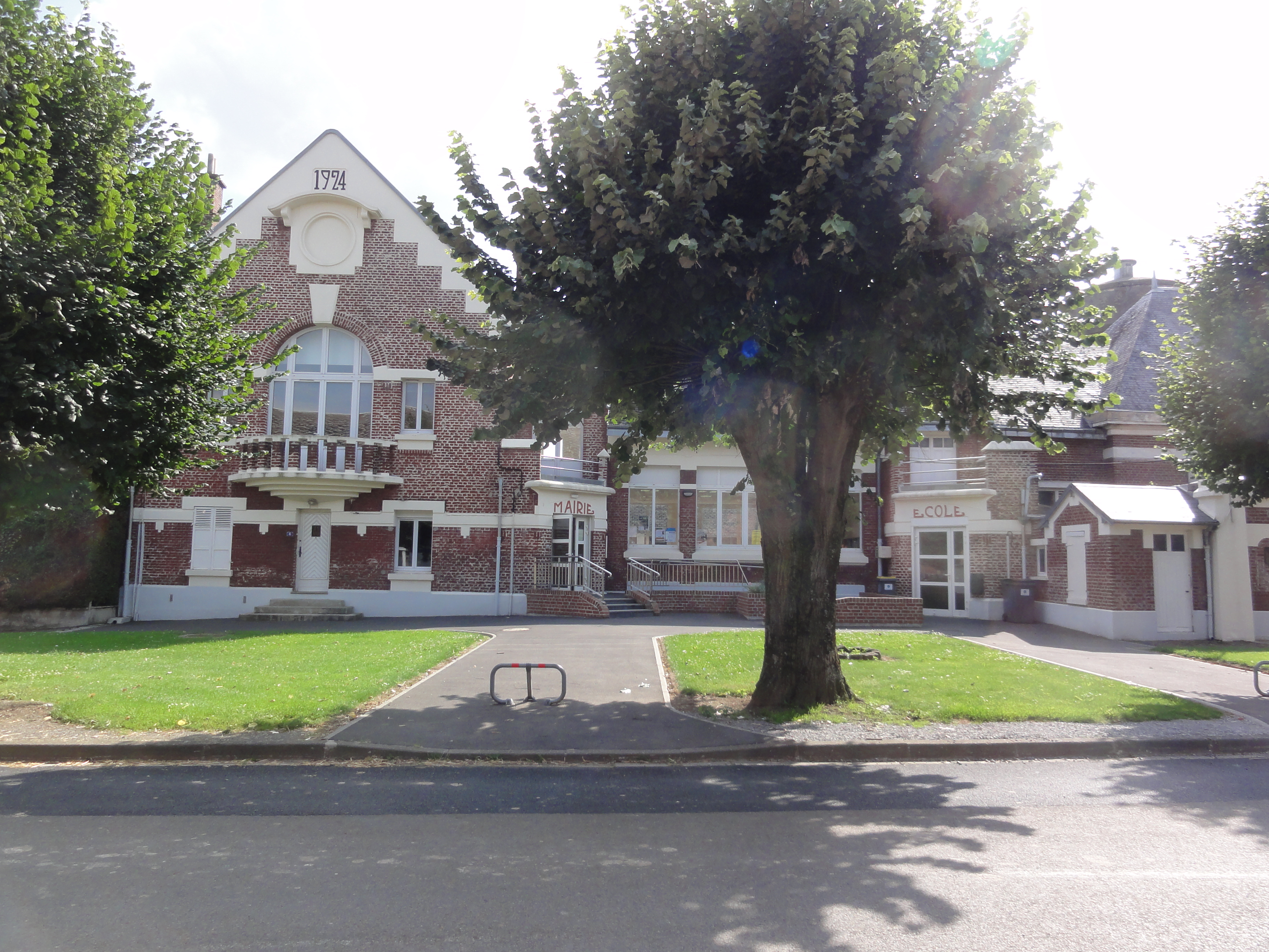 Le Verguier (Aisne) mairie et école